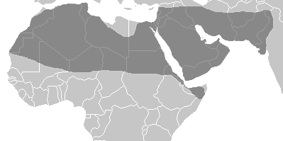 Gesamtverbreitungsgebiet der Dornschwanz-Agamen, Gattung Uromastyx